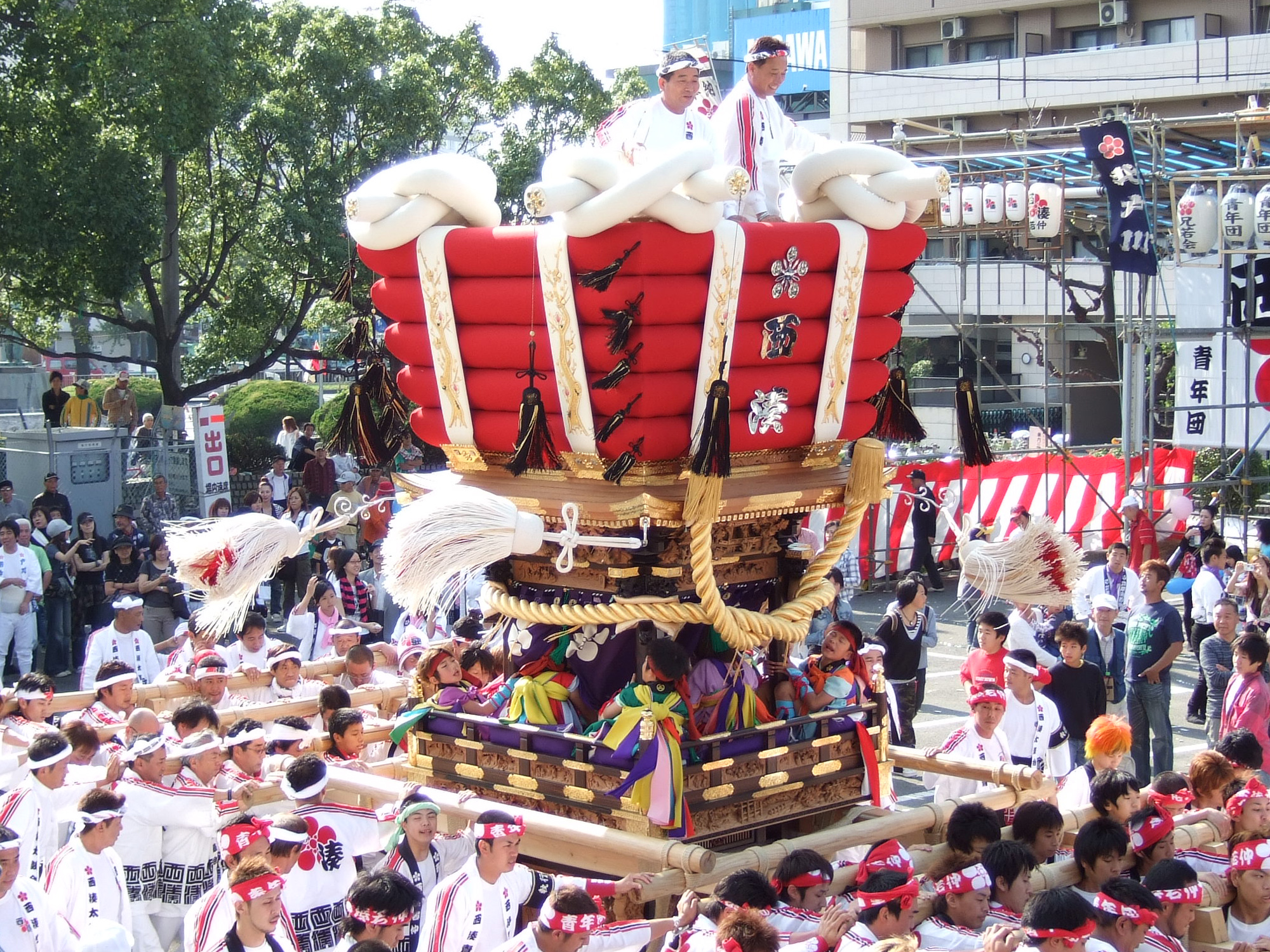 大阪 堺 西湊 ふとん太鼓 2006年堺まつり